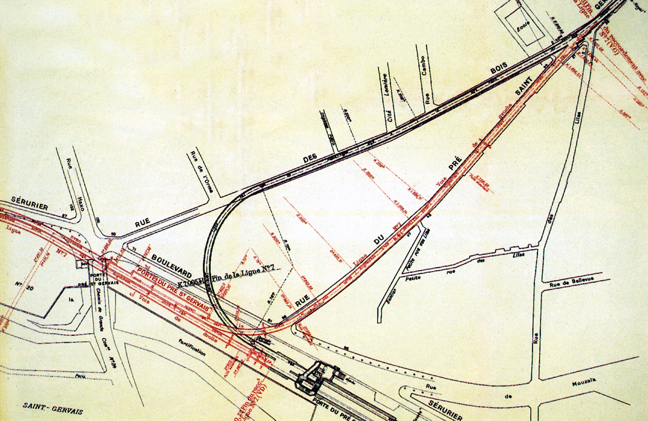 Plan de la voie des Fêtes (en rouge) et de la station Haxo (nommée Porte du Pré-Saint-Gervais, en rouge), métro de Paris, France.